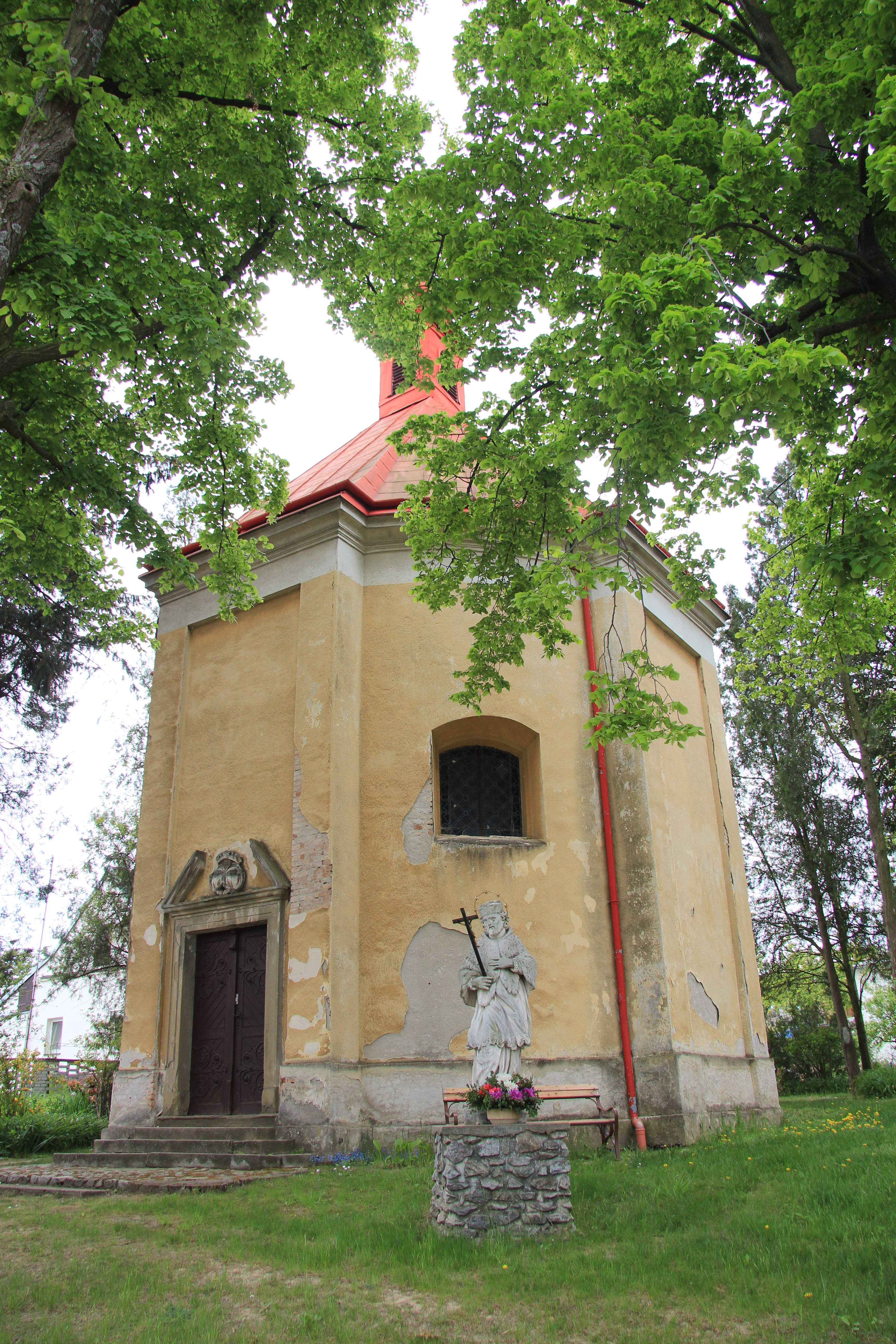 Kirche in Dolenice und davor der hl. Nepomuk, Südmähren